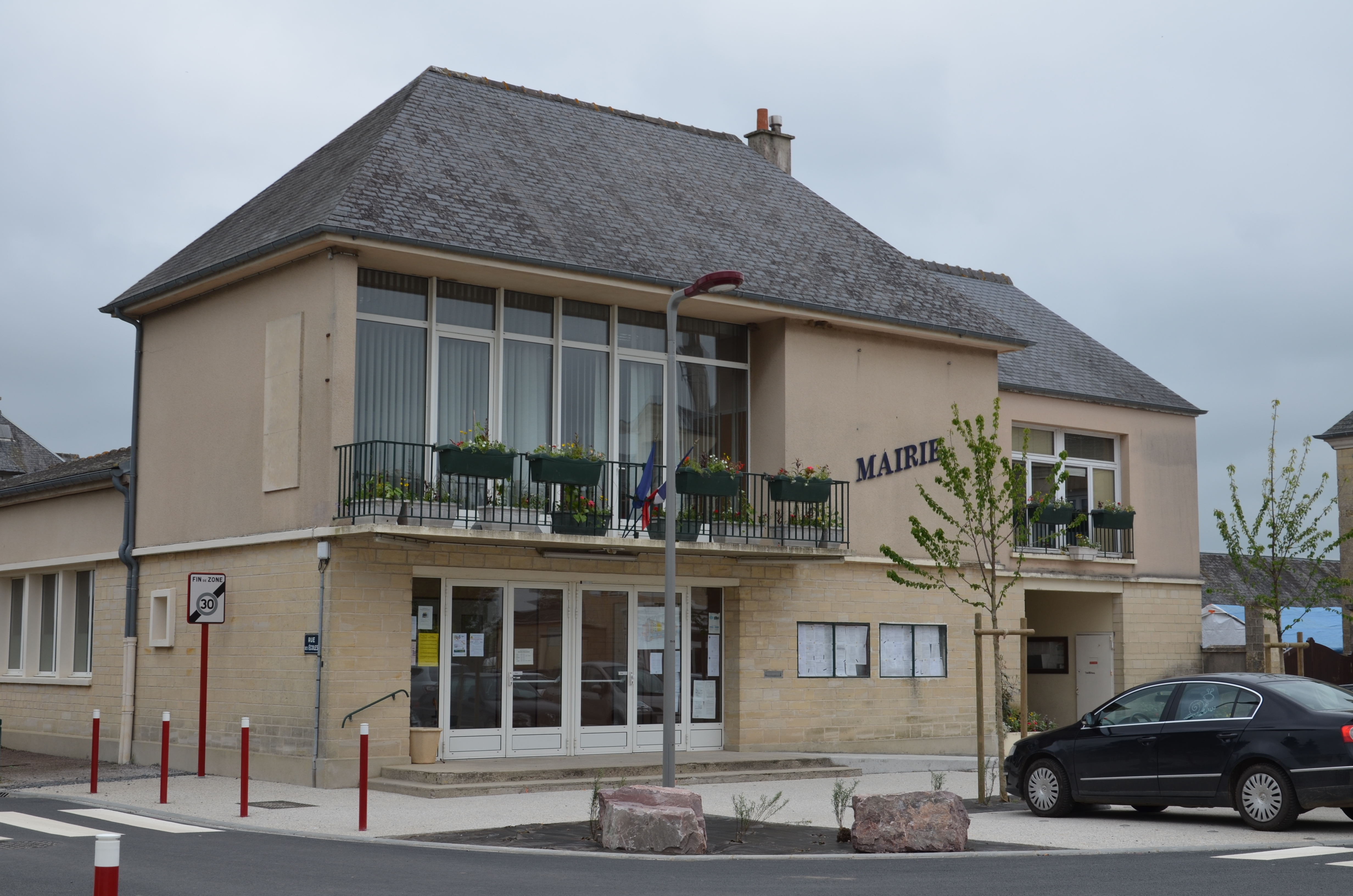 Hôtel de ville de Noyers-Bocage.